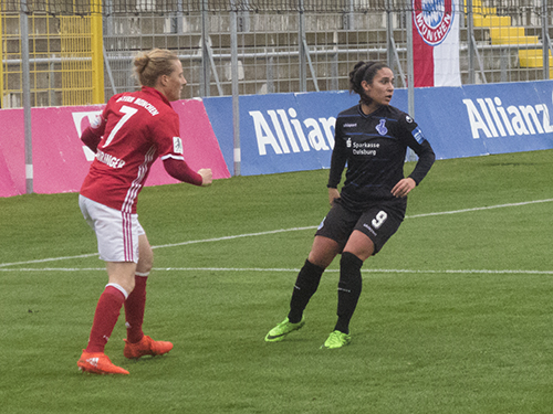 Lee Sima Falkon